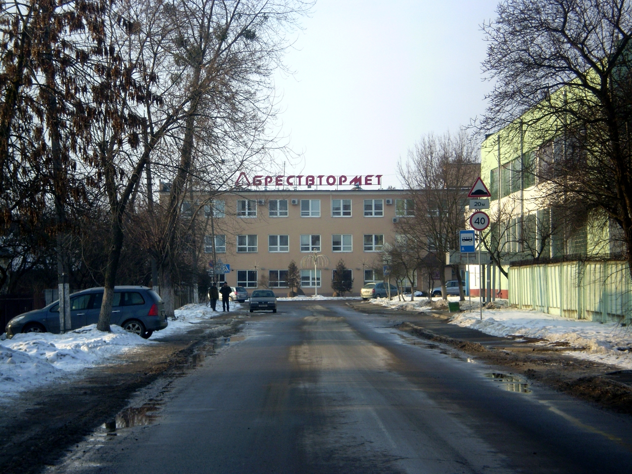 Брэстдругмет